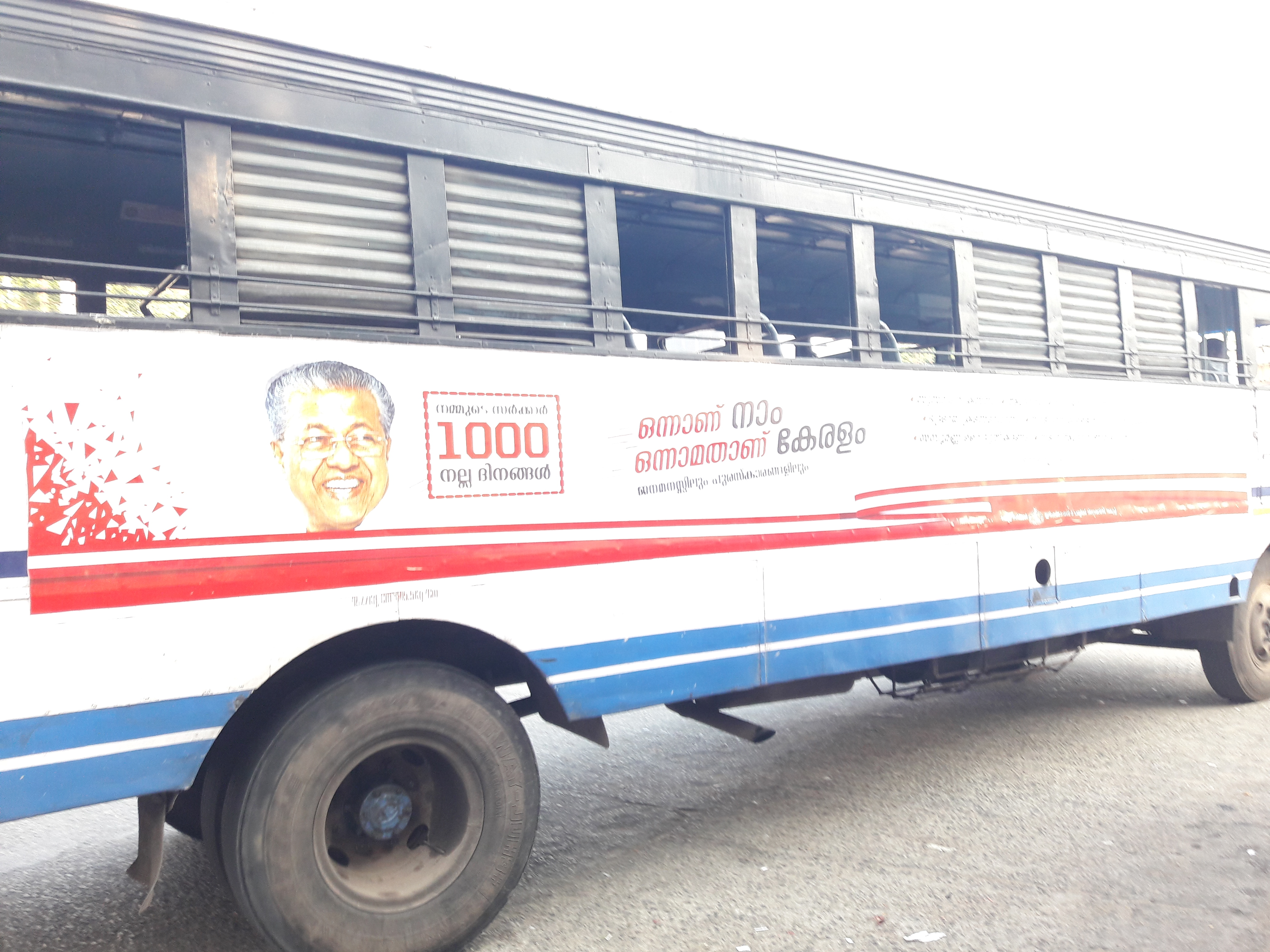 കേരള സ്റ്റേറ്റ് റോഡ് ട്രാൻസ്പോർട്ട് കോർപ്പറേഷൻ